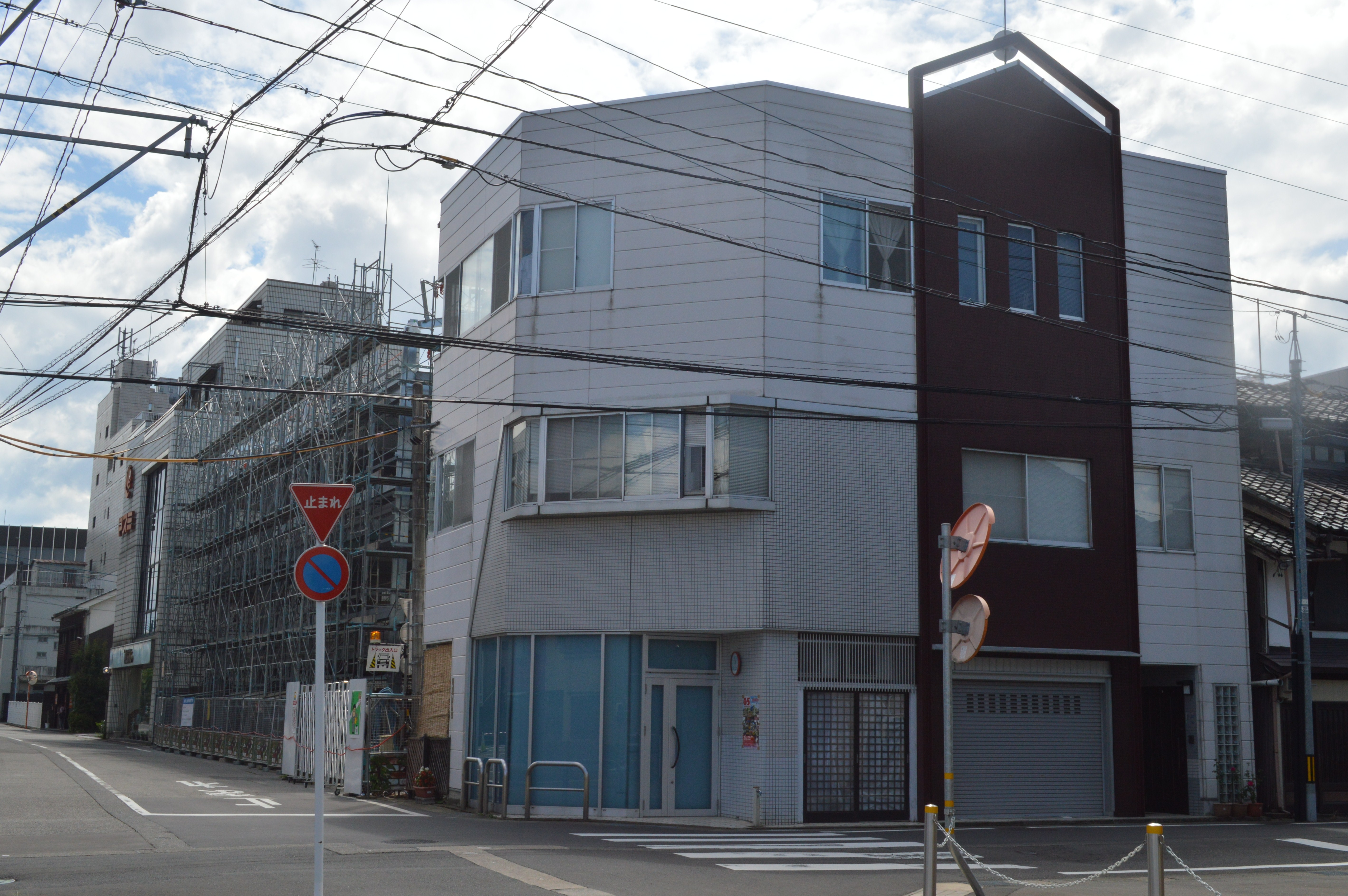 福井県越前市